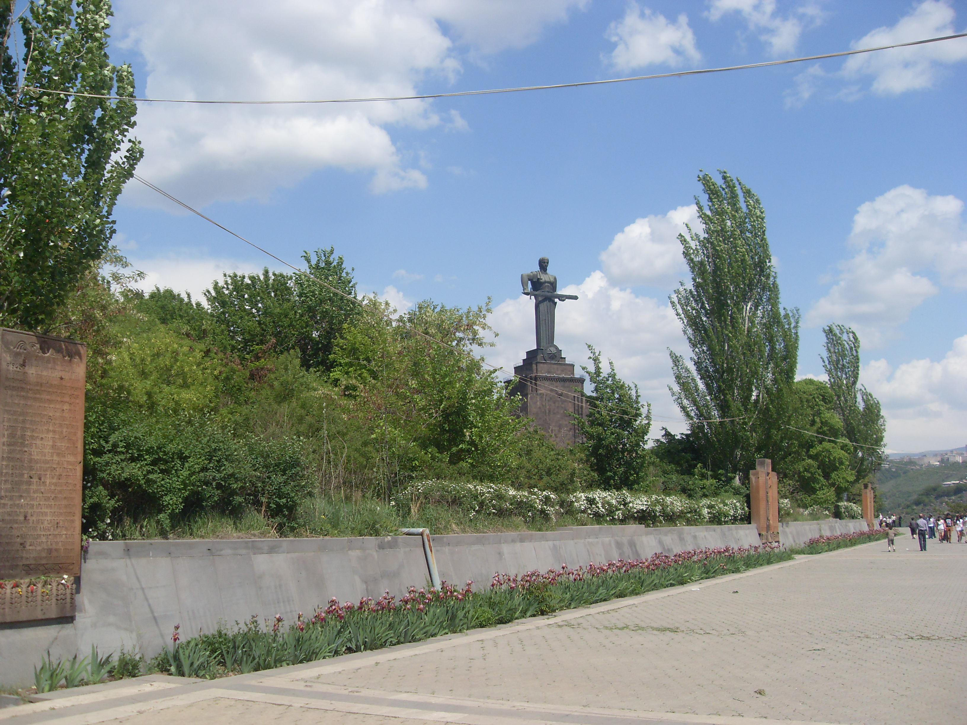 «Մայր Հայաստան» hուշարձան, 1968 թ., ճարտ.` Ռաֆայել Իսրայելյան, քանդ.` Արա Հարությունյան 12/10.3